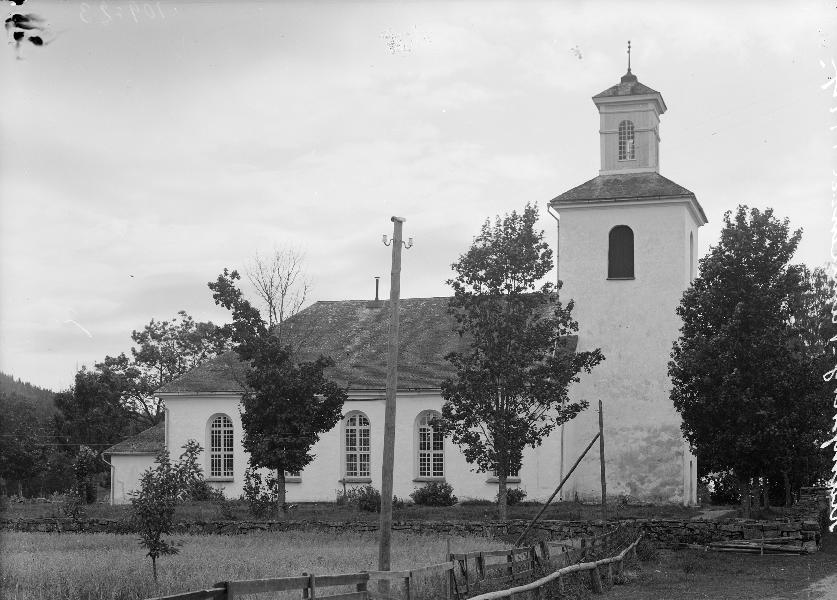 Kyrkan mot norr.